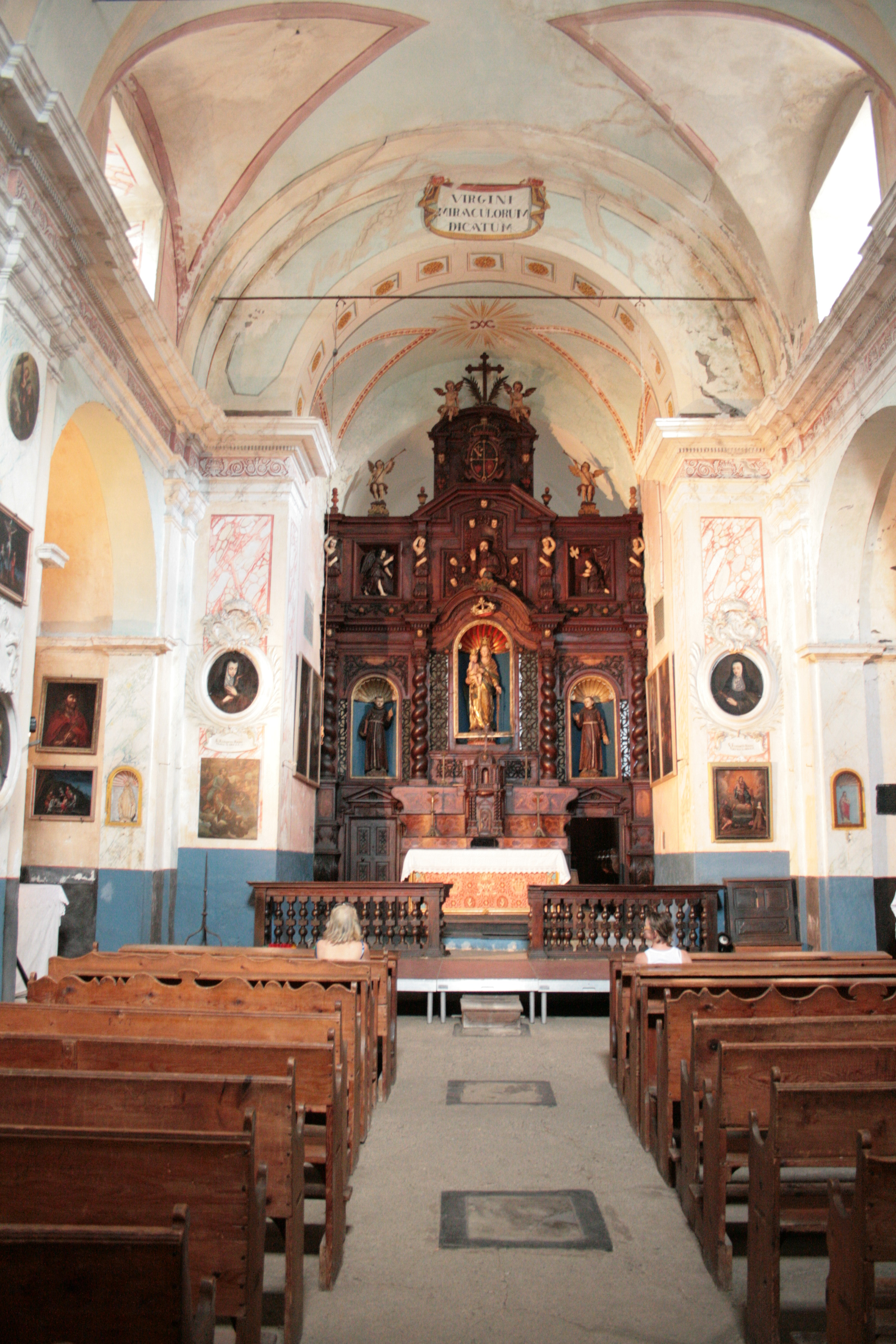 Saorge, monastère franciscain. Vue de l'église, décoration baroque.